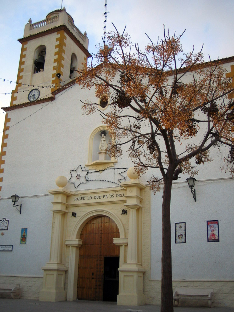 Iglesia Parroquial de Nuestra Señora de los Desamparados. Desamparados (Orihuela).